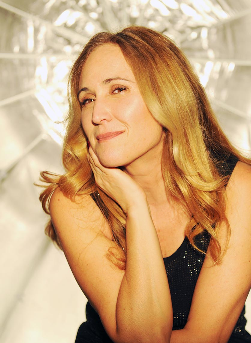 somarè